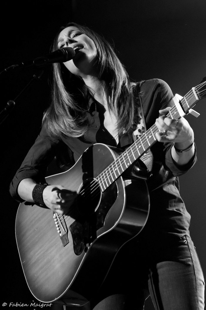 Rose en Concert